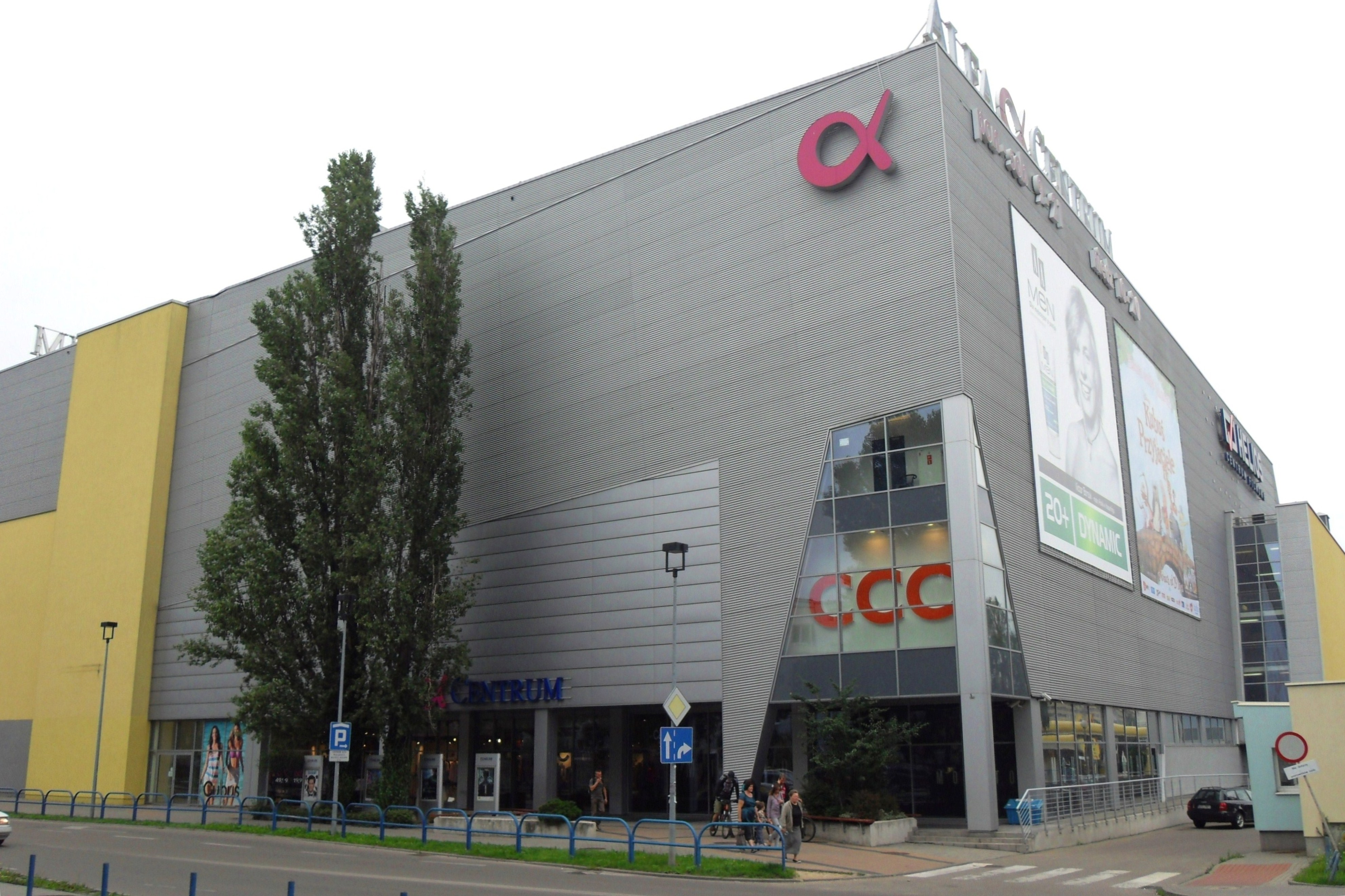 Gdańsk Przymorze Małe. Galeria handlowa "Alfa Centrum", ul. Kołobrzeska 41C.